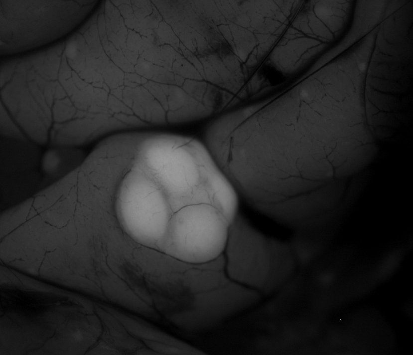 Small intestine and Peyer's patch in MHCII-EGFP knock-in mouse model visualized by stereo microscope.